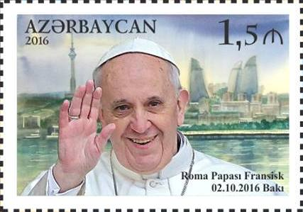 The visit of Pope Francis to Azerbaijan. N 1283 – 1,5 manat. The stamp is dedicated to the pastoral visit of Pope Francis to Azerbaijan on 2nd of October 2016.